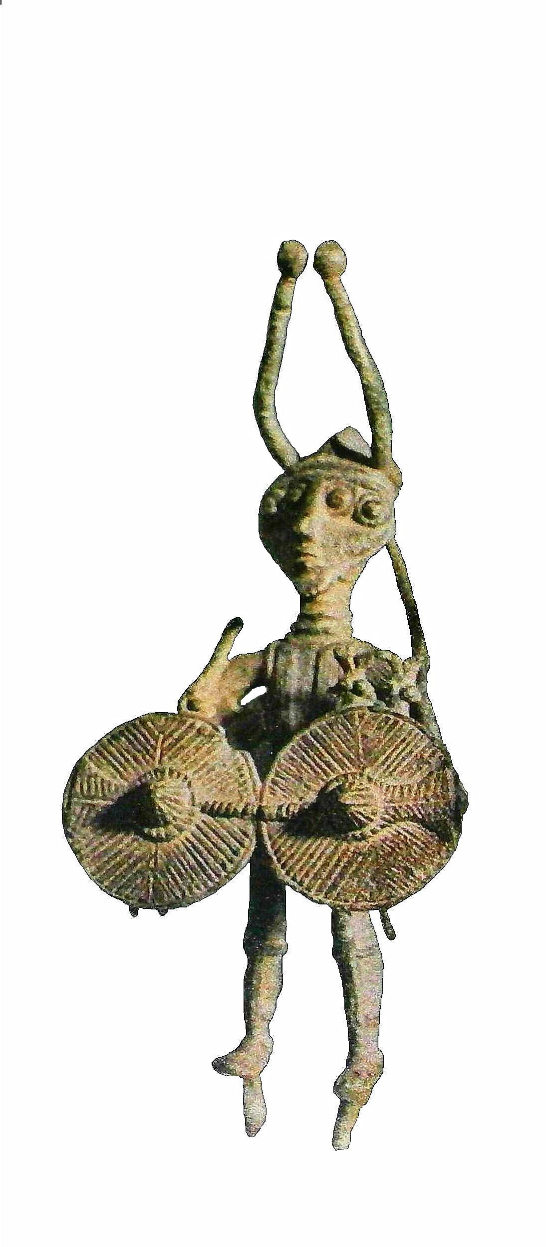 Bronzetto Nuragico - Cagliari - (Italy) - Museo Archeologico Nazionale